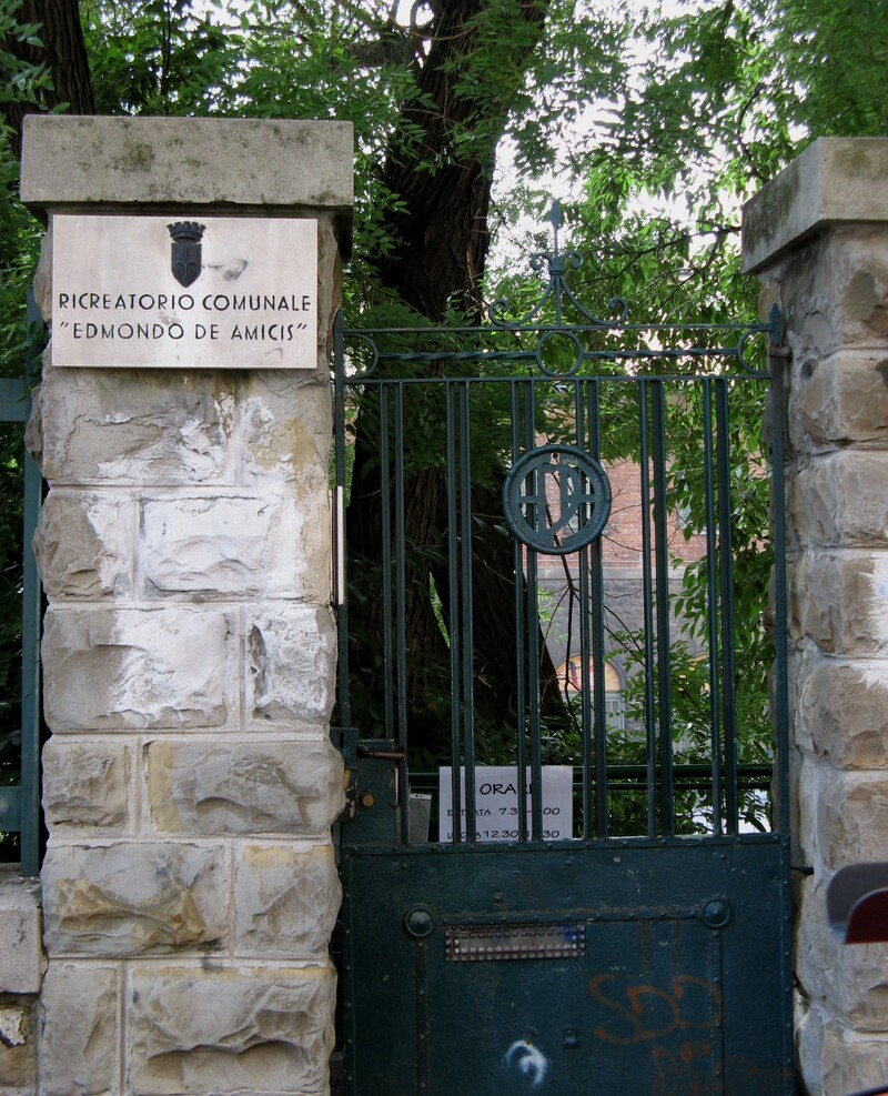 Entrata del ricreatorio De Amicis, Trieste